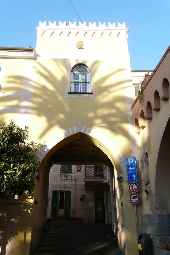 Diano Castello, Liguria, Italia